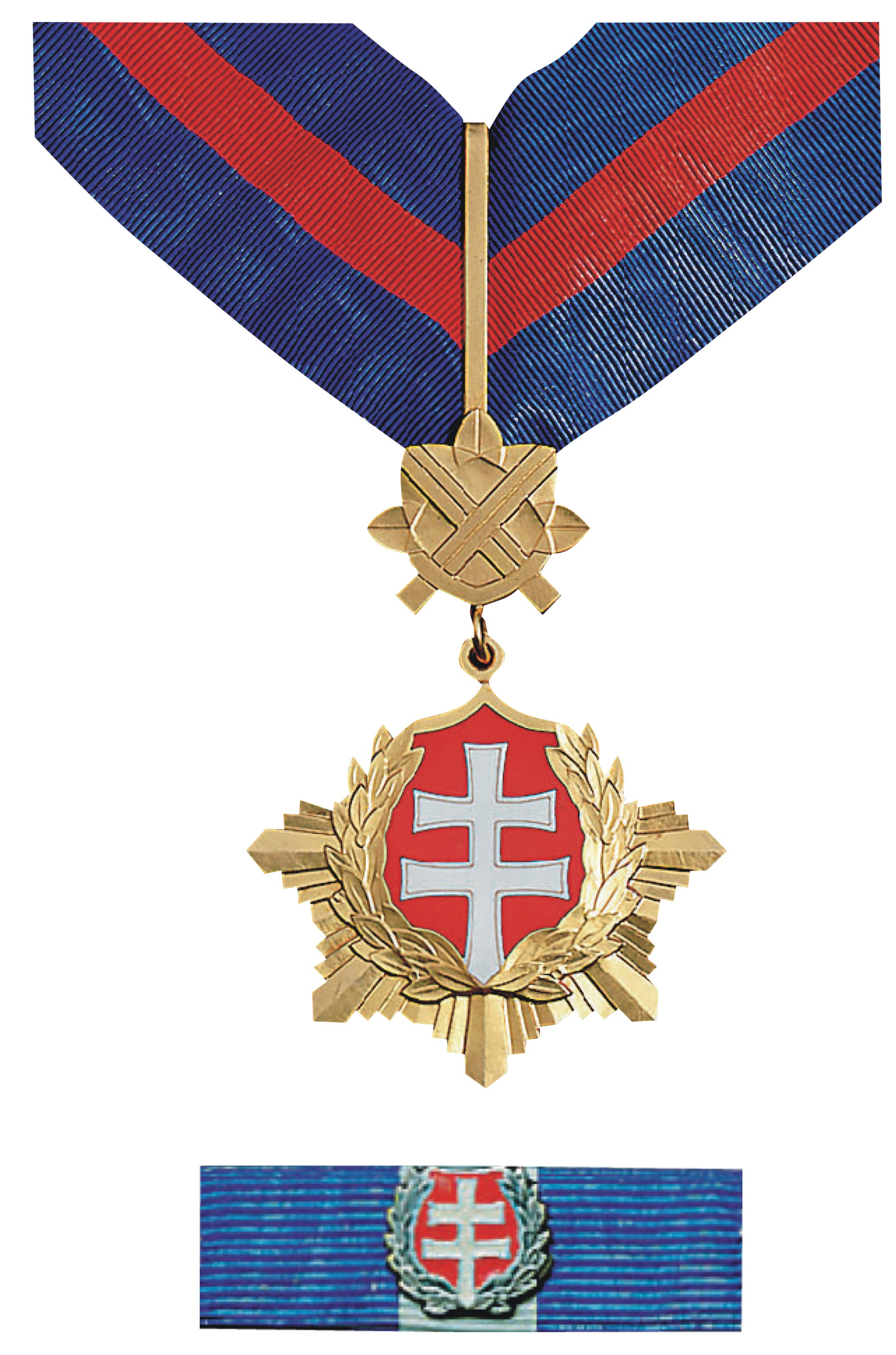 Rad bieleho dvojkríža 3. triedy vojenského druhu. Insígnie vojenského druhu III. triedy radu tvorí: radový kríž s náhrdelníkovou stuhou, radová stužka a radová rozeta. Radový kríž má priemer 60 mm, je razený zo striebra, pozlátený. Kríž vojenského druhu je heraldicky stvárnený rovnako ako radový kríž II. triedy. Kríž sa nosí na náhrdelníkovej stuhe, ktorá je rovnaká ako stuha II. triedy. Radová stužka a radová rozeta sú stvárnené rovnako ako radová stužka a radová rozeta II. triedy. Na miniatúre je bronzový olivový veniec.